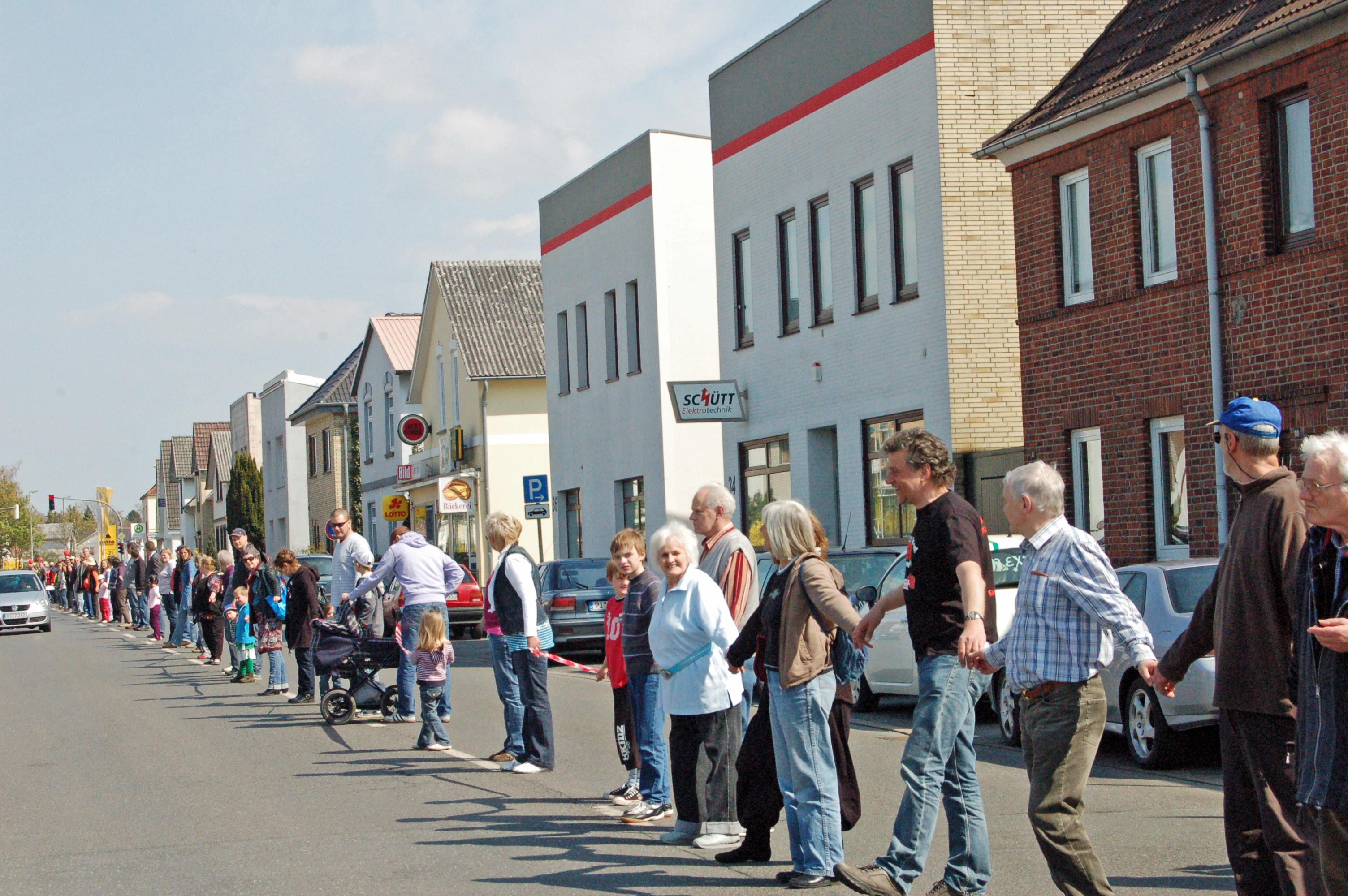 Aktions- und Menschenkette "KETTENreAKTION" in Uetersen am 24. April 2010